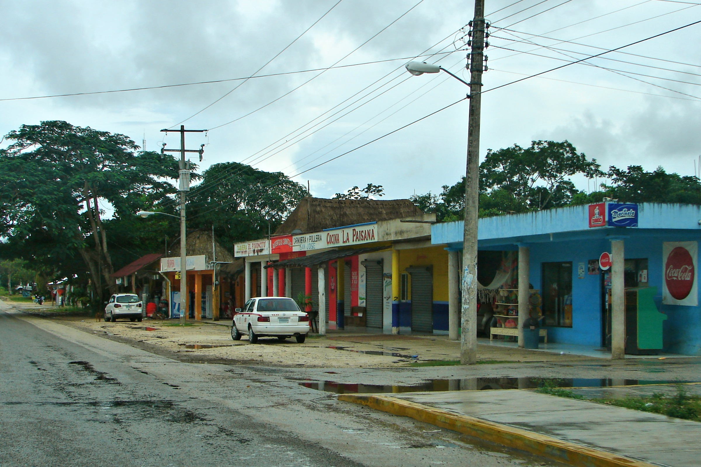 Francisco Hu May (Tulum Municipality), Quintana Roo, Mexico